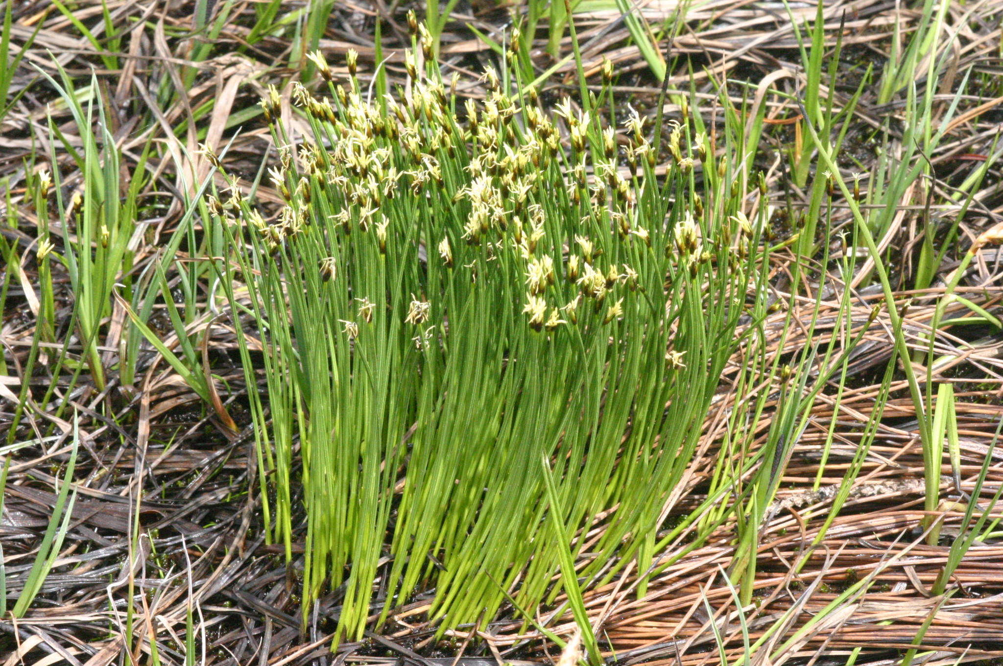 Trichophorum cespitosum subsp. cespitosum (Rasen-Haarbinse) Aufnahmeort: Planneralm, Steiermark, Austria